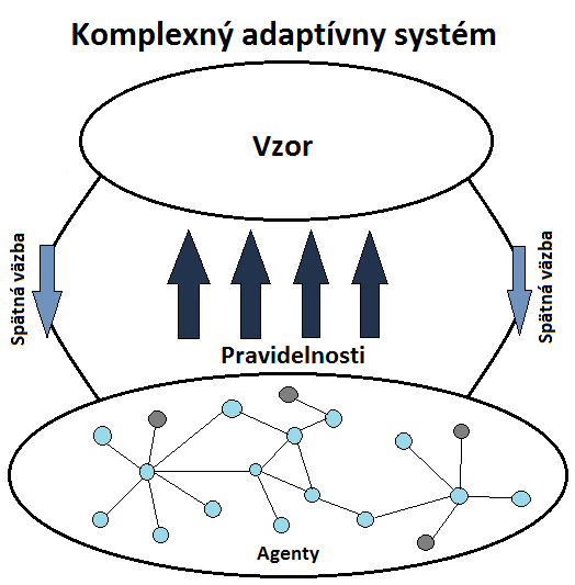 Scháma komplexného adaptívneho systému